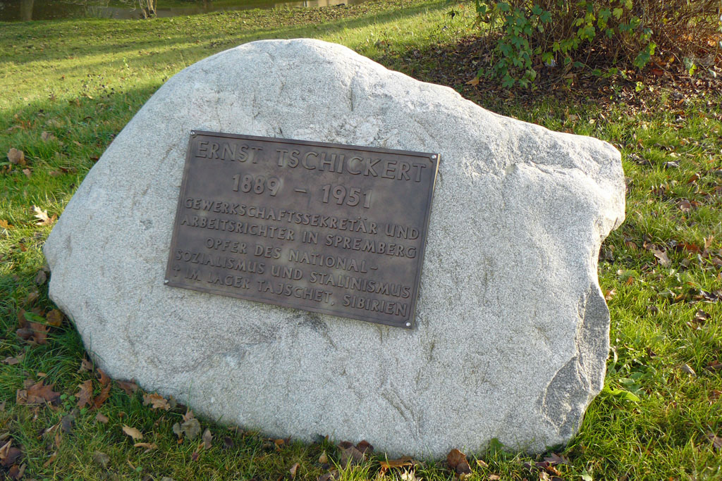 Gedenkstein für Ernst Tschickert, einen aktiven Gewerkschaftler und Widerstandskämpfer aus Spremberg.